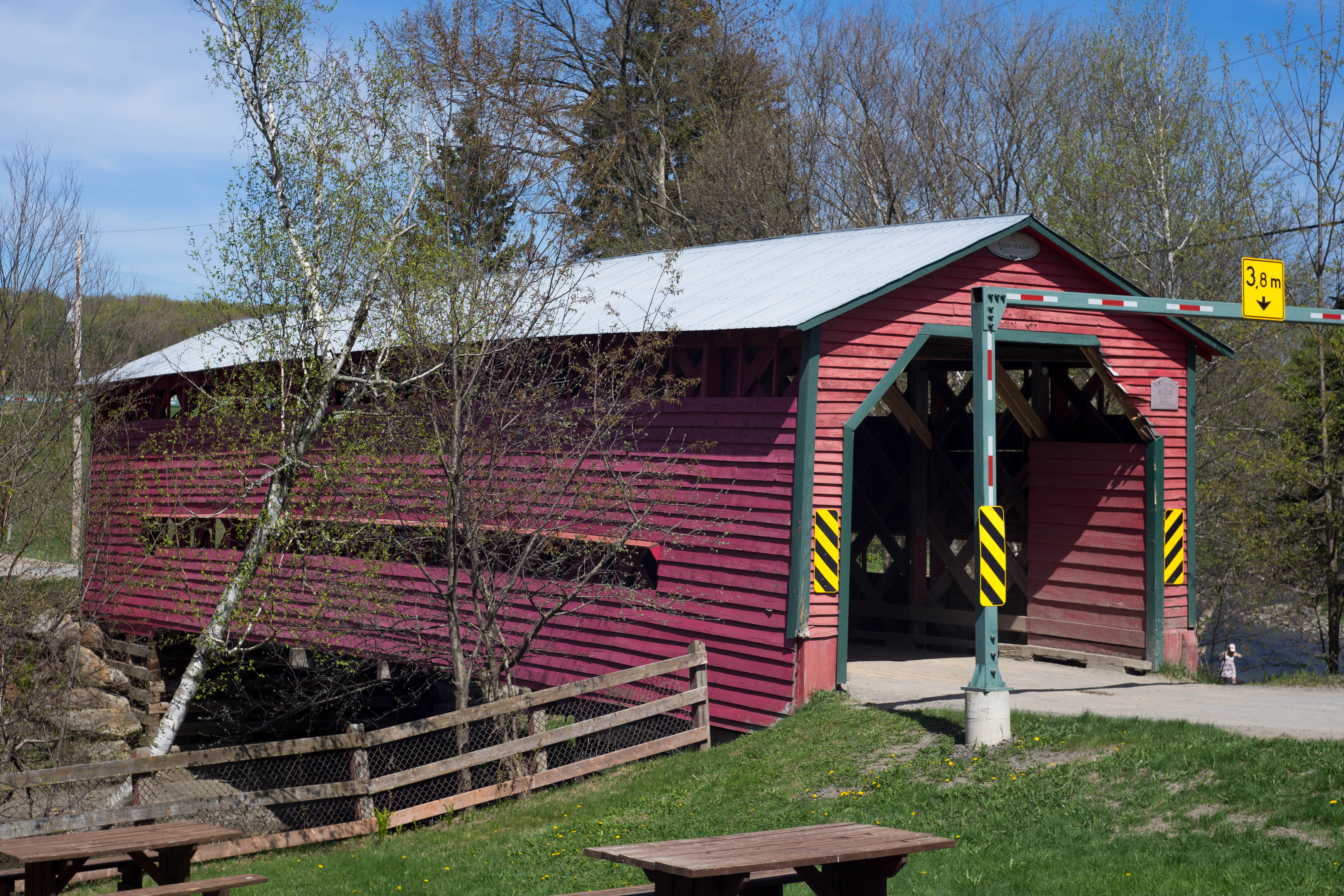 Pont Saint-André au printemps 2020.